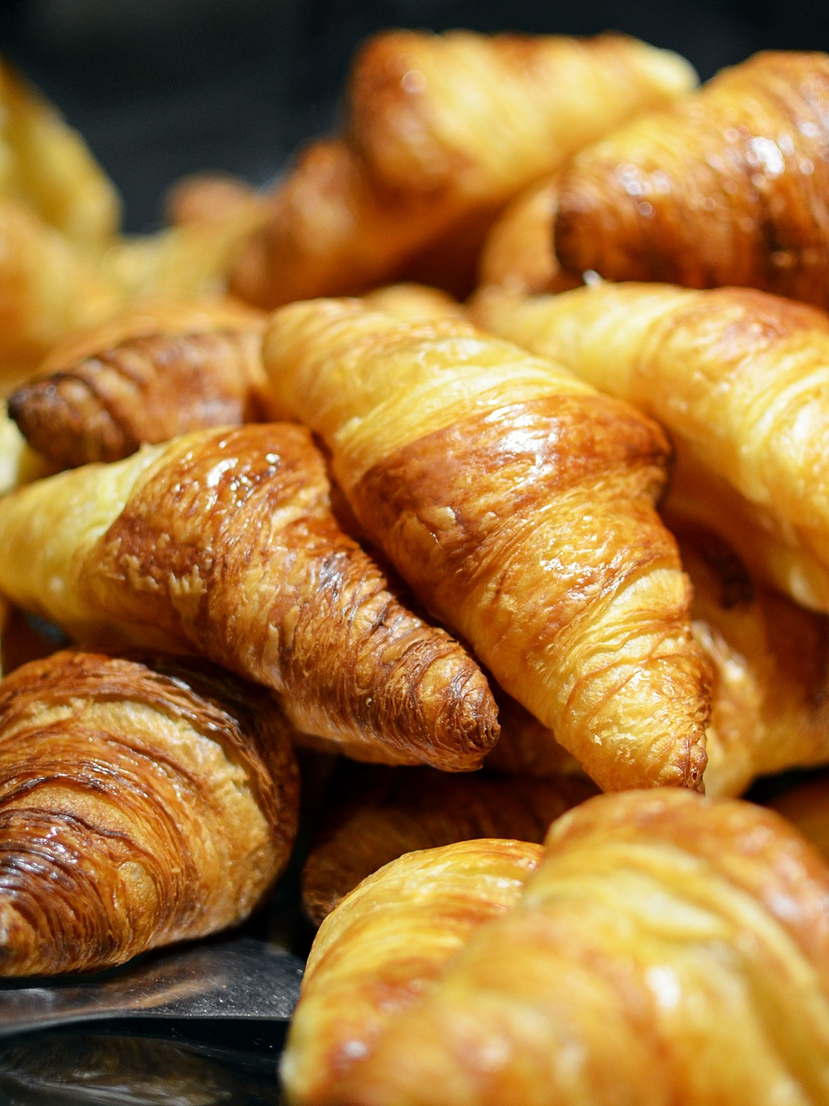 Viennoiserie typiquement française